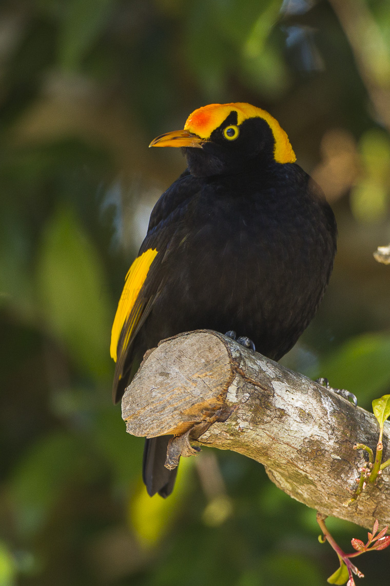 Regent Bowrebird - Lamington NP - Queensland_S4E6131